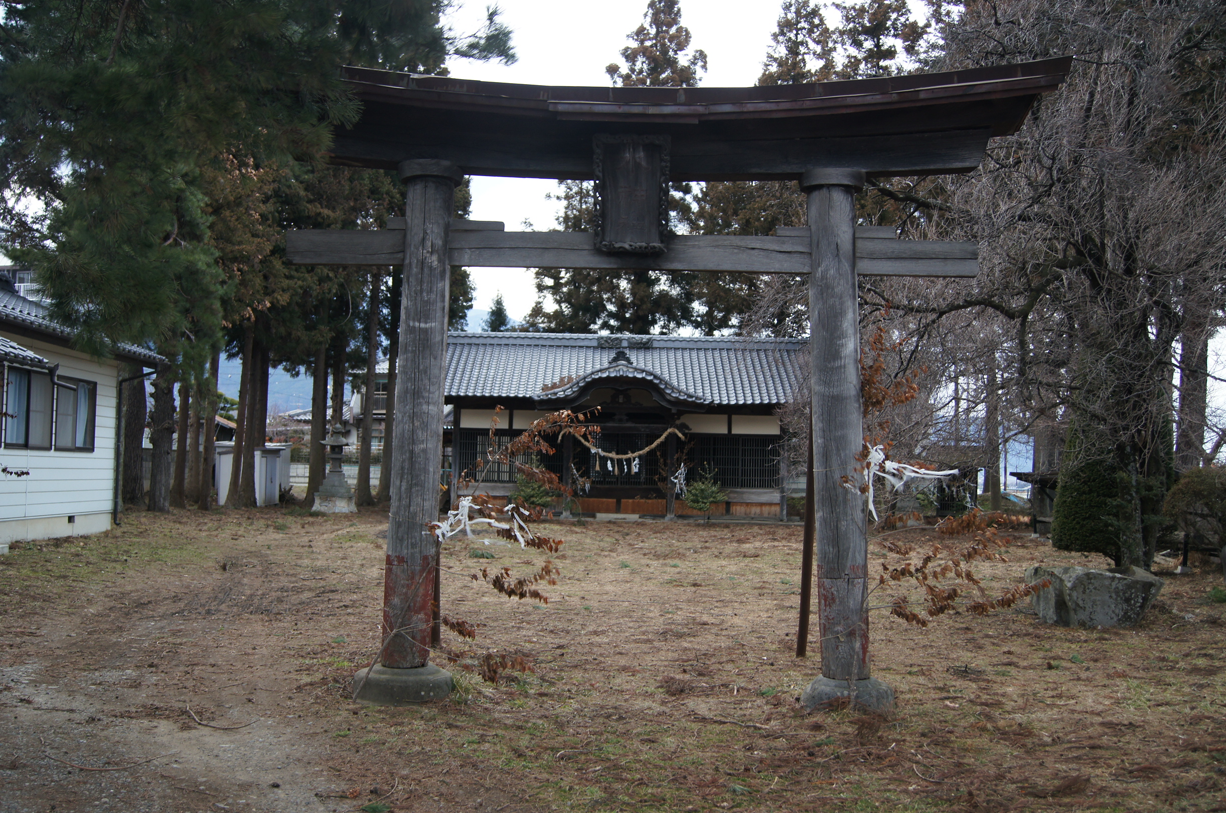 長野県松本市波田の御渡海道にある「水神社」。地元では「水神様」と呼ばれる。波田堰の完成を祝い、豊作と安定した水の供給を祈願したものと思われ、1883年に設立された。